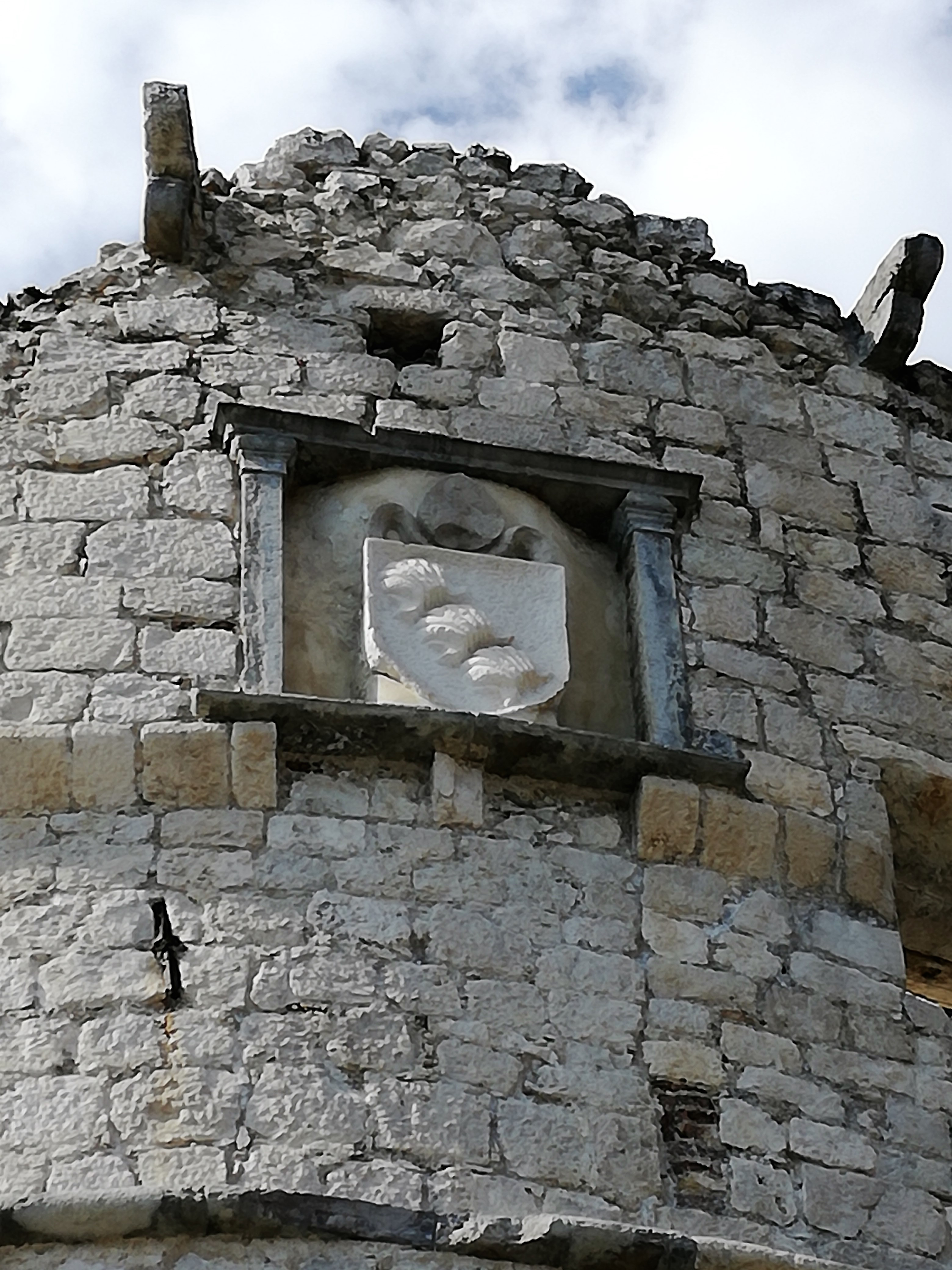 Wappen des Fürstbischofs Georg von Neideck am Bastione in Riva del Garda